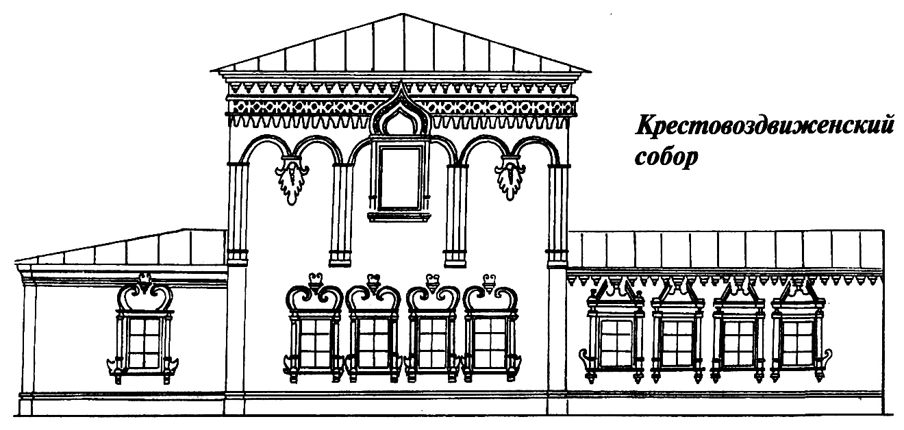 Крестовоздвиженский собор. План. Вид 2003 года. Город Соликамск